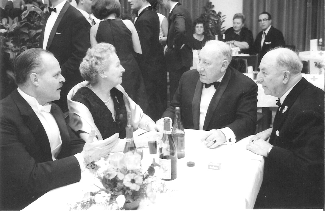 Katharina Bregant mit LH Josef Krainer von Steiermark und Unterrichtsminister Dr. Piffl-Percevic